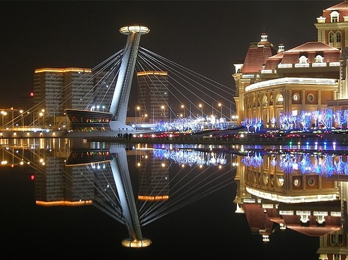 海河赤峰桥夜景